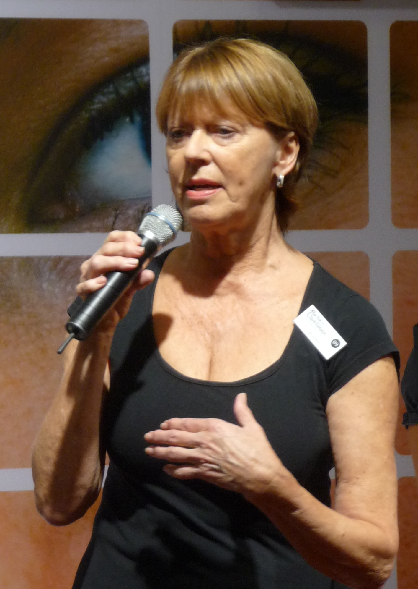 Lill Lindfors på bokmässan i Göteborg 2009.